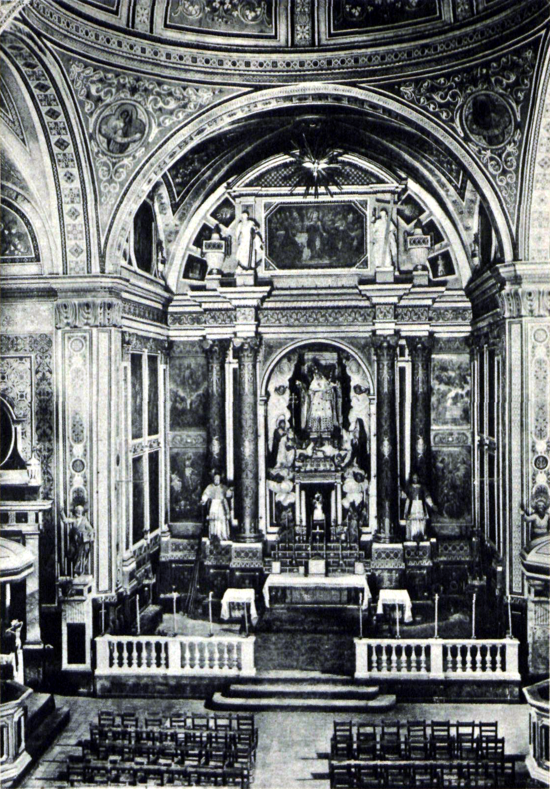 Còpia de la fotografia feta per Gaietà Barraquer i Roviralta publicada al vol. II de "Casas de Religiosos..." amb el peu de foto "Retablo de los Dominicos de Vich (fotografia del autor, 1903)"